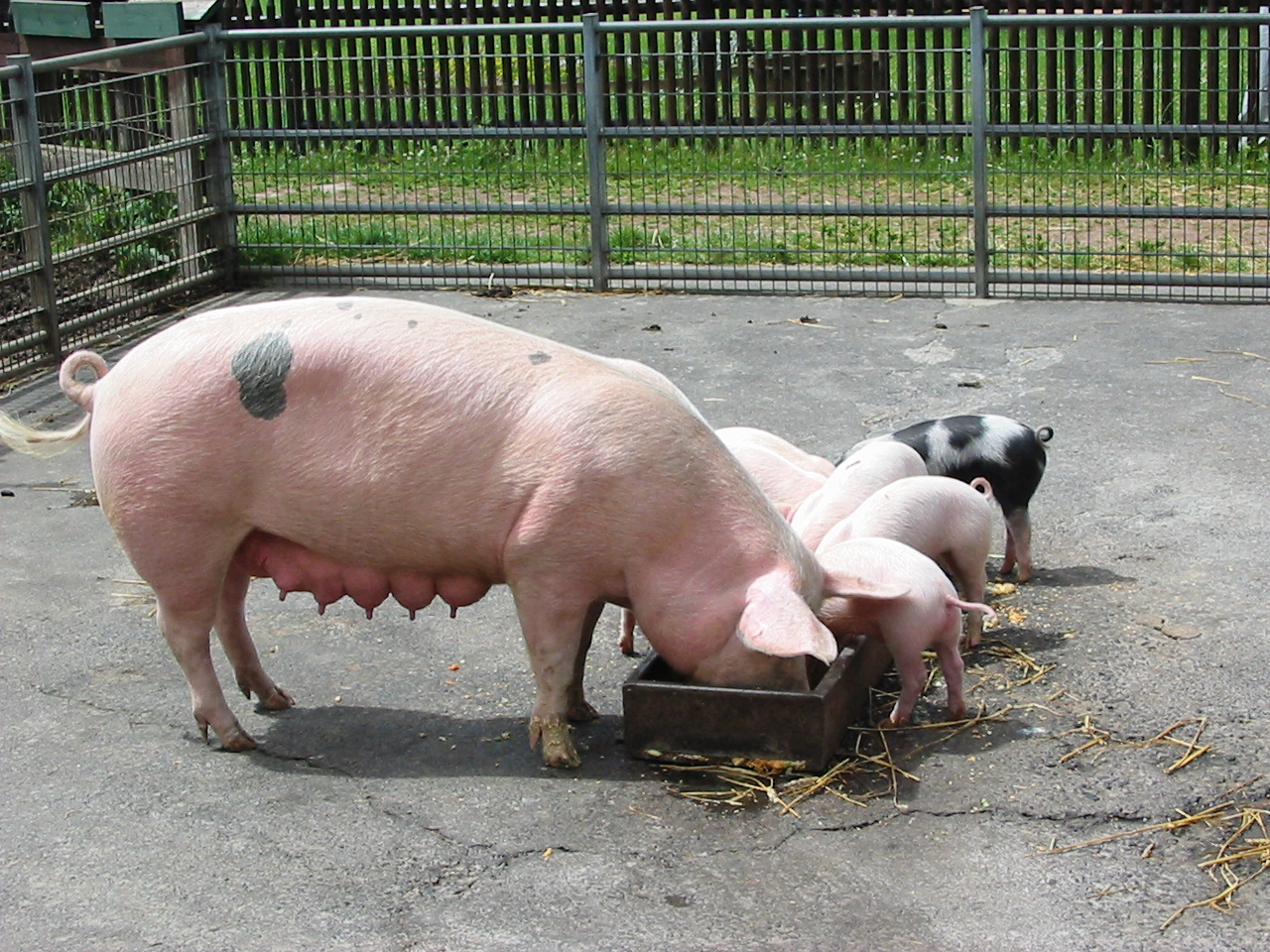 la truie et ses petits mangent dans leur auge